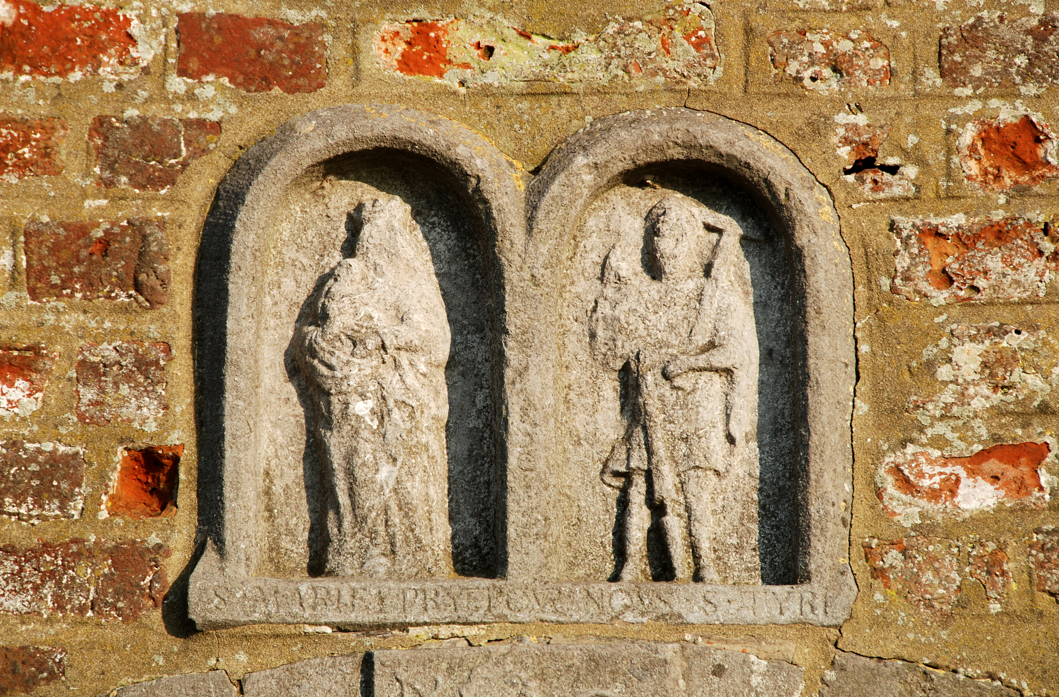 Belgique - Bousval -Chapelle du Try-au-Chêne